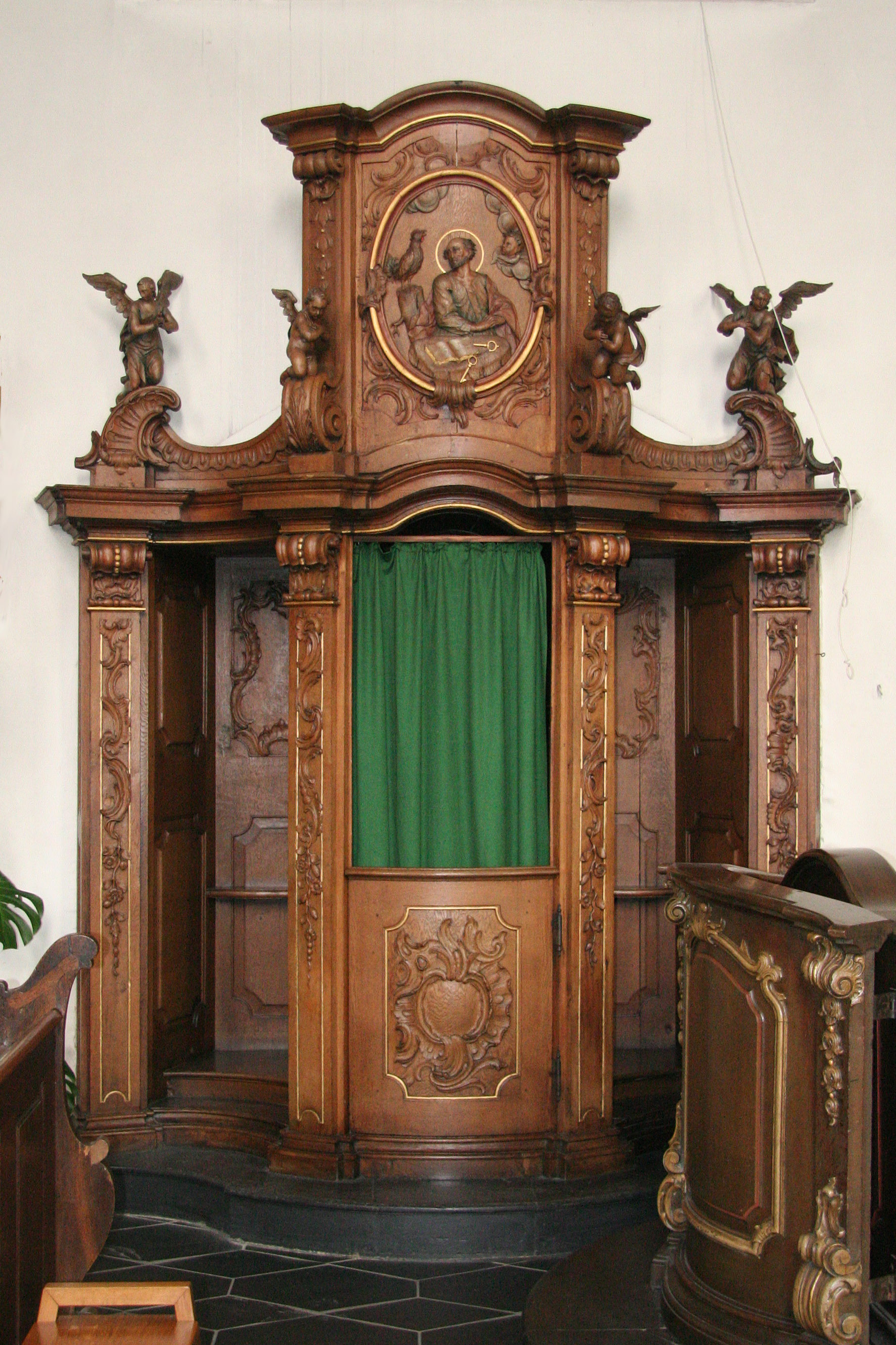 Beichtstuhl in der Nikolaikirche Brilon (vorn links)